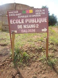 Ecole publique de Nsang 2 à Baloum